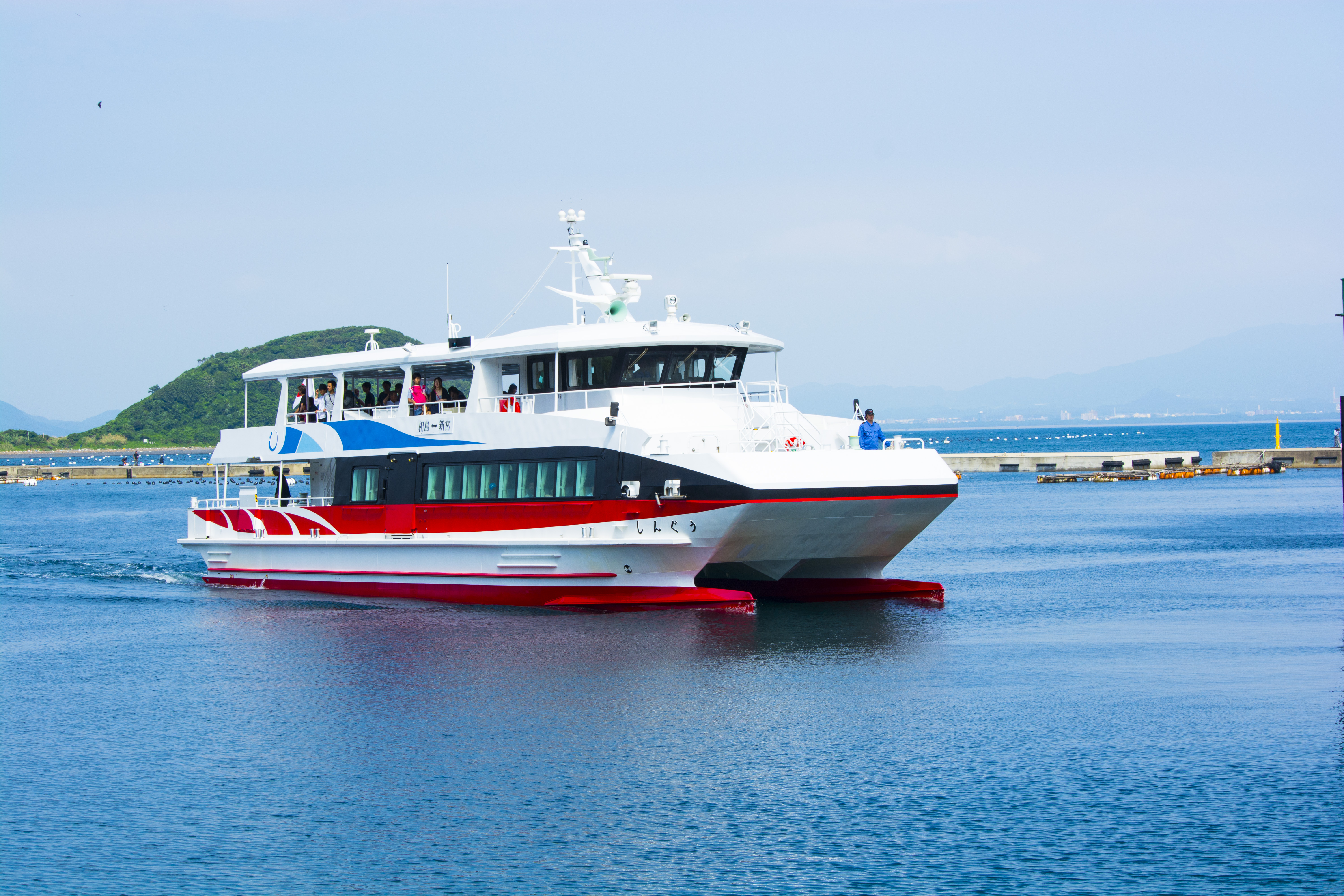 福岡県糟屋郡新宮町の町営渡船しんぐう。町営渡船しんぐうは、新宮町と相島を繋ぐ重要な公共交通機関である。